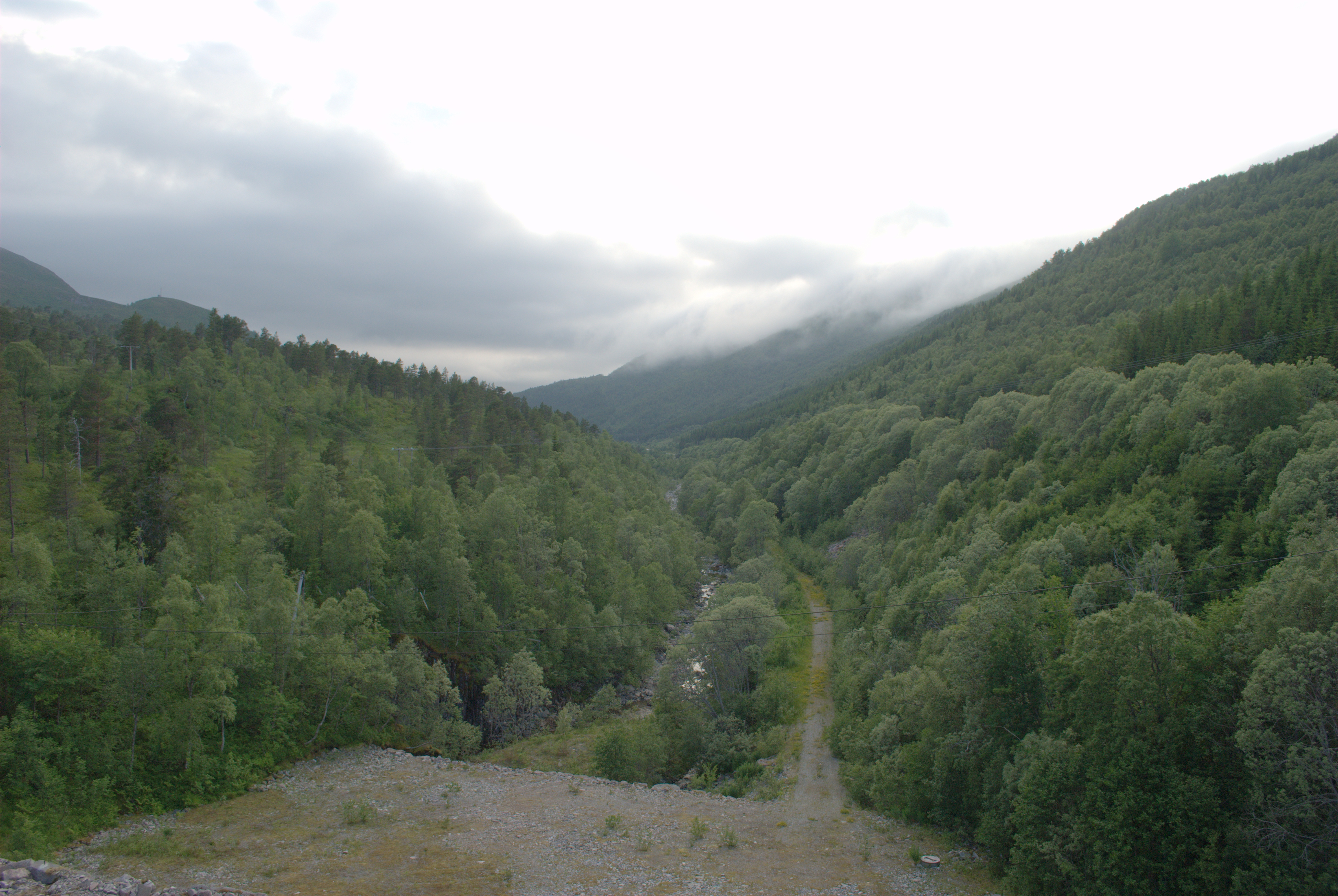 Elva Søa / Søo i Hemne kommune i Sør-Trøndelag. Bildet viser elven og utsikten fra steinfyllingsdammen ved vestenden av Vasslivatnet og vestover nedover Søvassdalen.